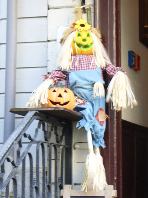 Hallowe'en beim Eifeler Hof